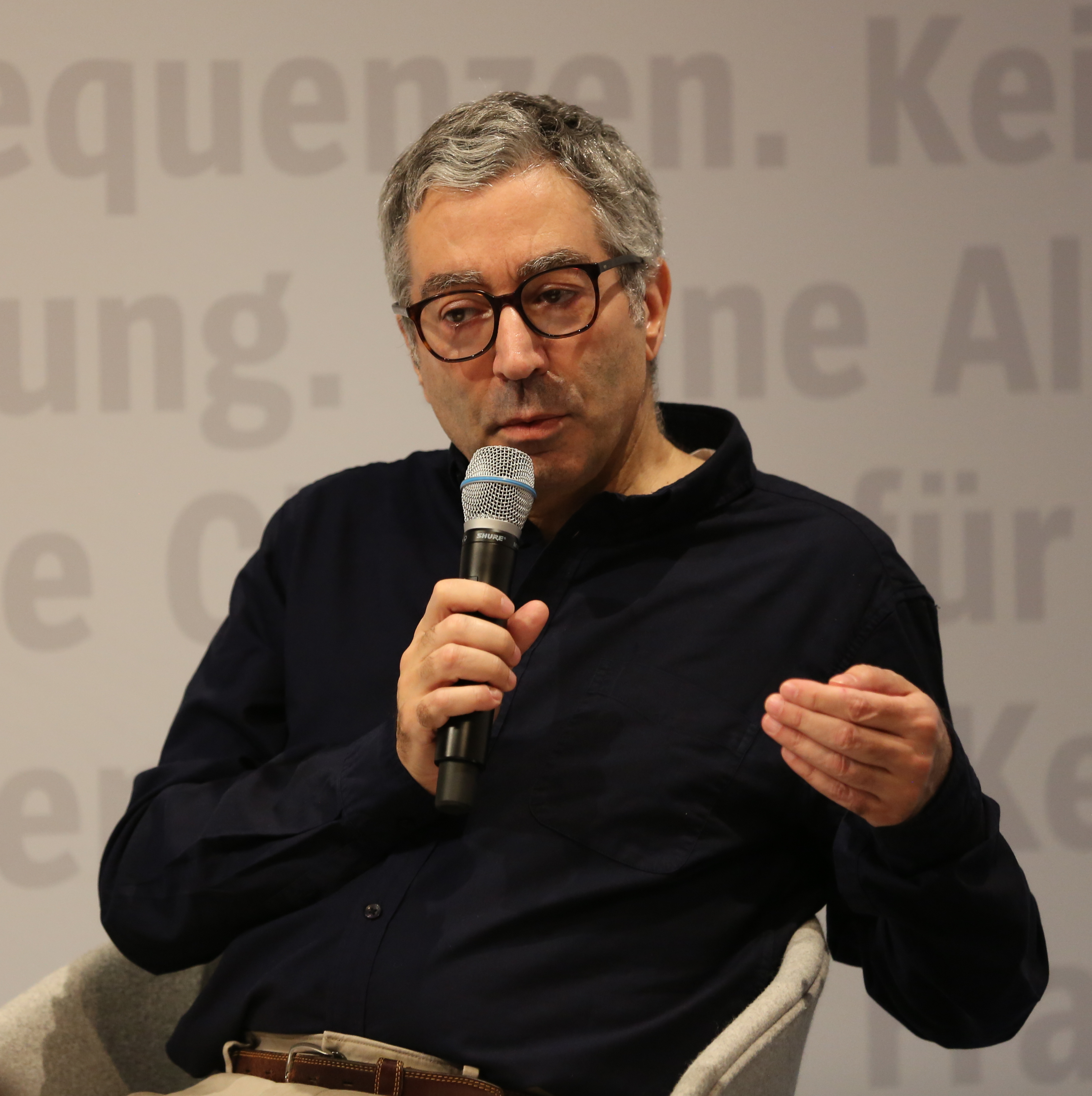 Didier Eribon bei der Frankfurter Buchmesse 2017